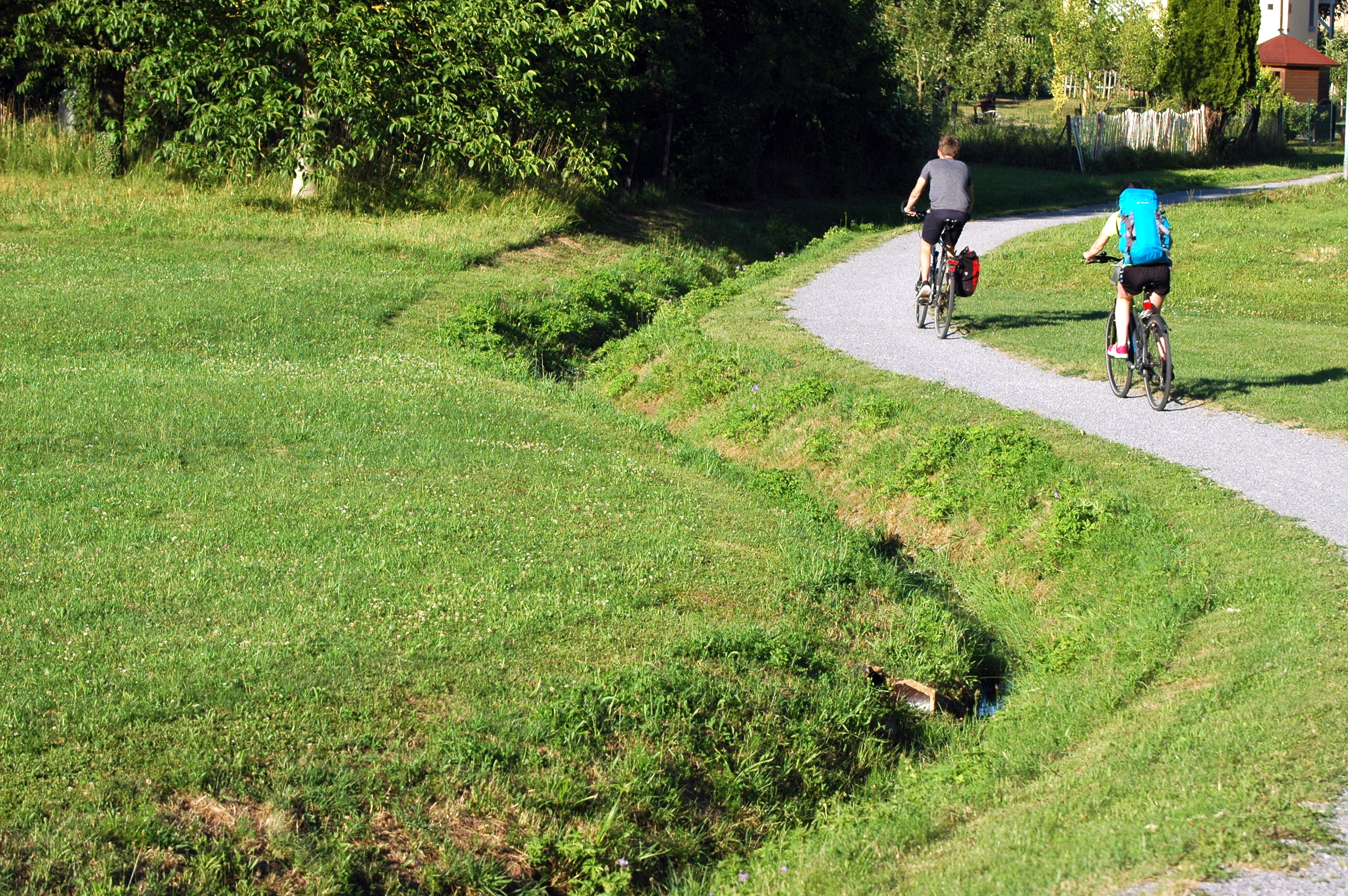 Fluss Elsenz